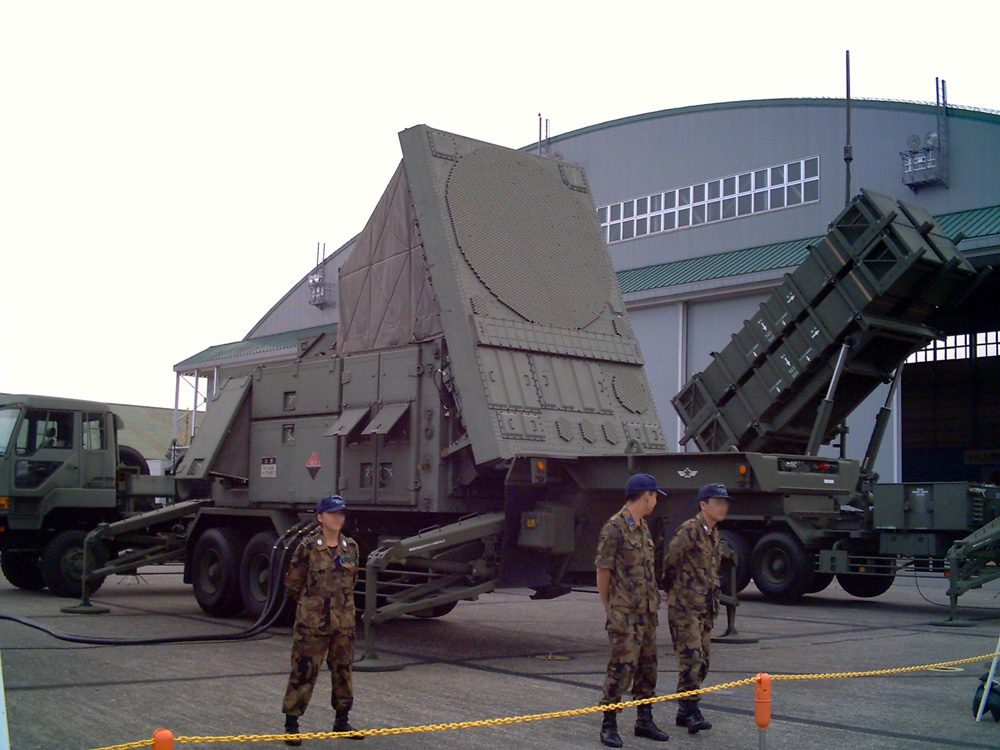 MIM-104 Patriot Radar unit JASDF Iruma Airbase 2006 Japan